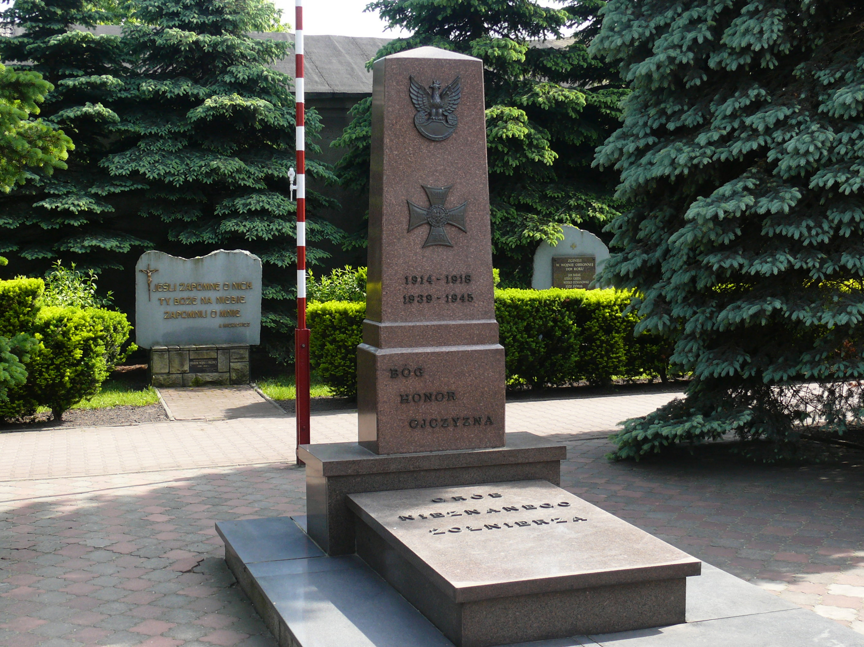 grób nieznanego żołnierza w Dąbiu